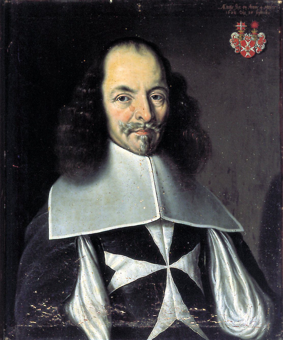 Porträt von Franz von Sonnenberg (1608–1682), Öl auf Leinwand, 1662. Privatbesitz in Zürich. Schweizer Militär in französischen Diensten, Malteserritter, Komtur von Villingen, Wietersheim, Leuggern-Klingnau, Hohenrain-Reiden, Regensburg, Altmühlmünster und Münchenbuchsee. 1682 Grossprior der Deutschen Zunge des Malteserordens, Komtur von Bubikon.